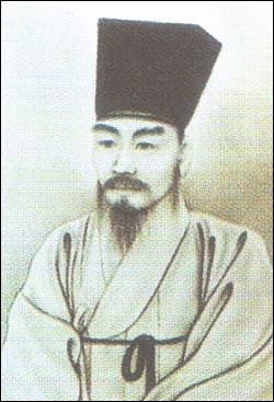 조선 중기의 문신, 학자 조광조의 영정